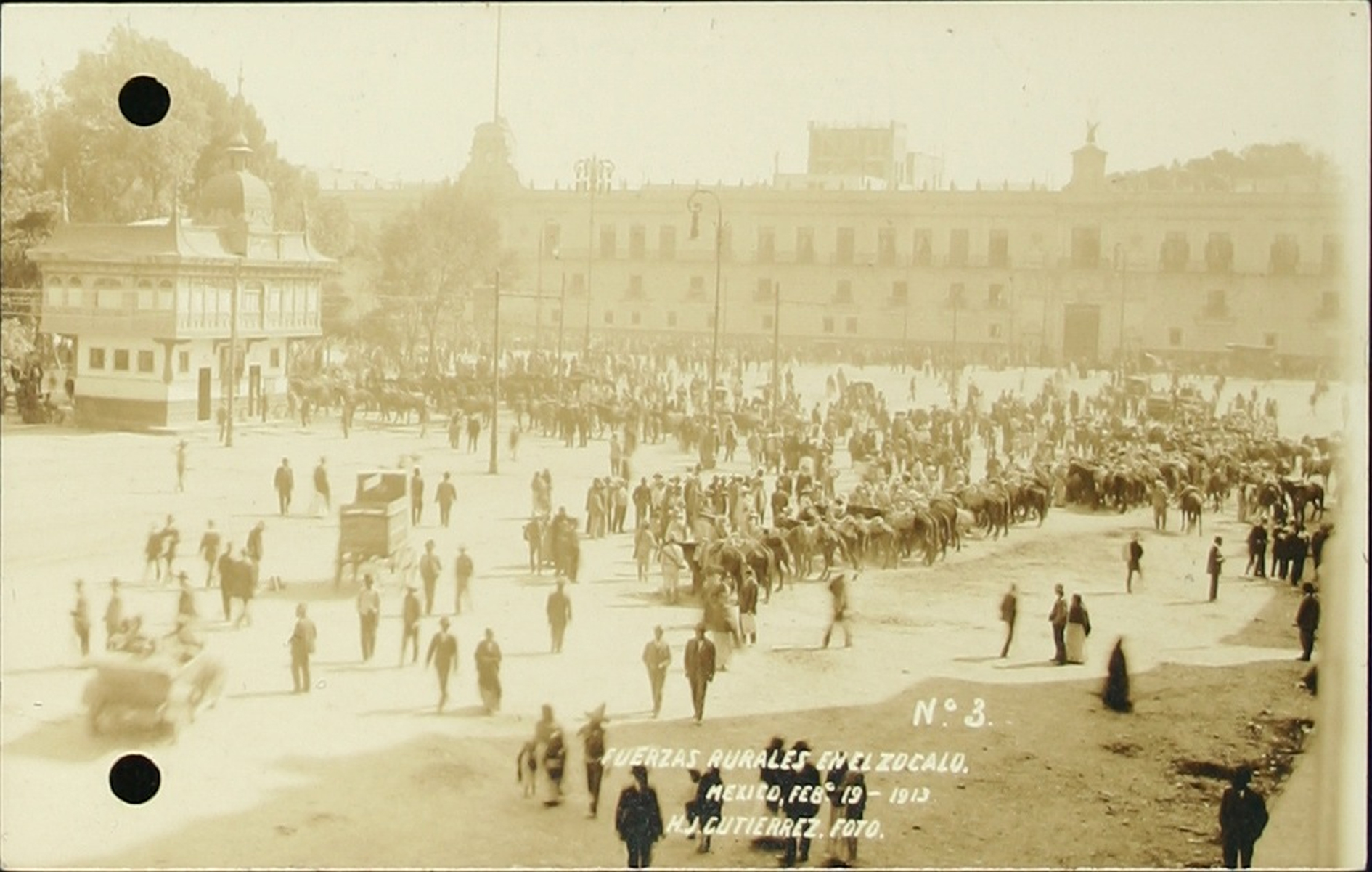 Decena Trágica